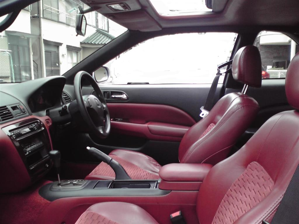 内装